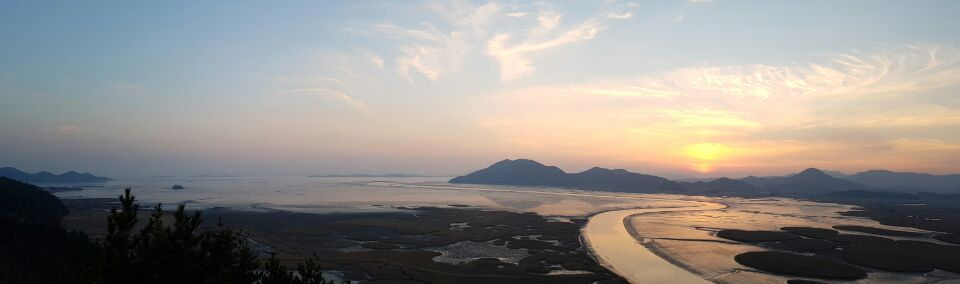 여수 순천만의 용산계곡 사진입니다